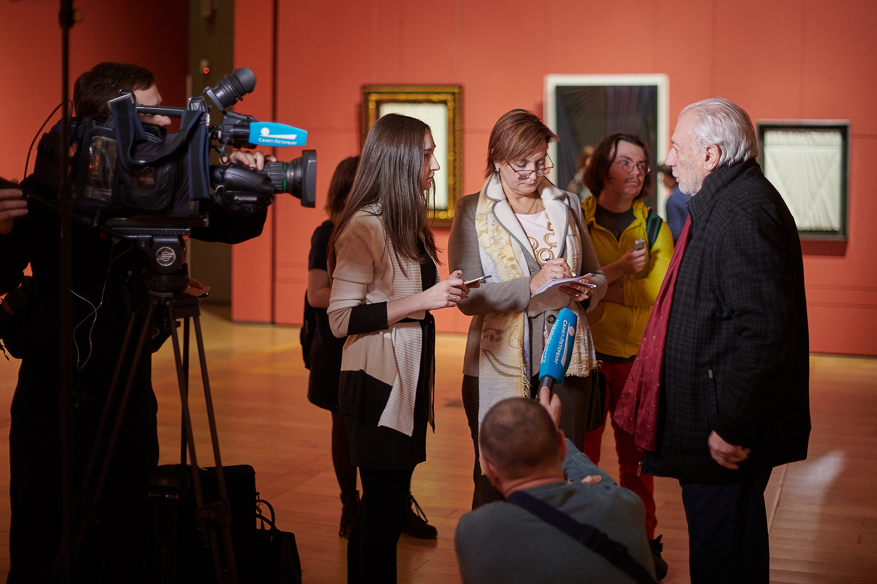 Umberto Mariani, mostra all'Ermitage, San Pietroburgo, 2019